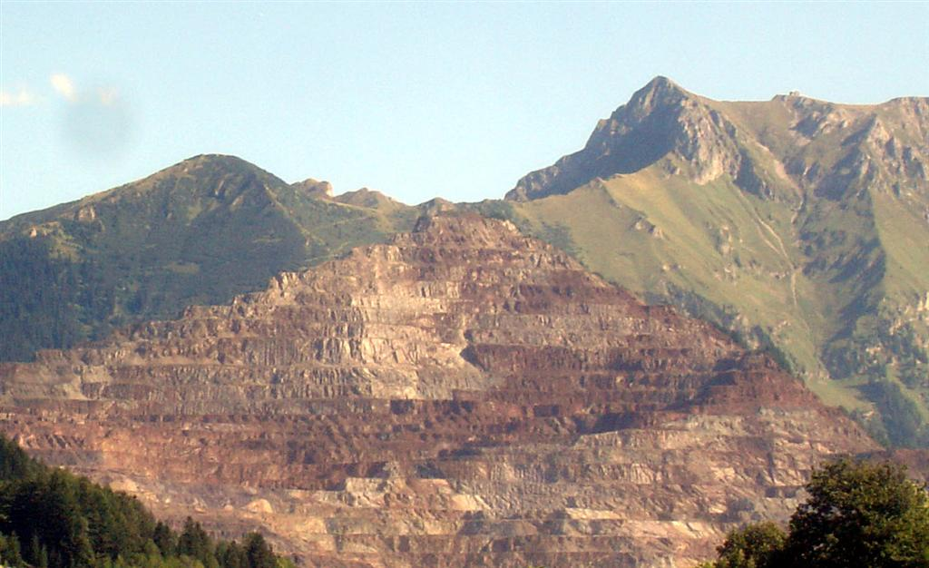 Erzberg near Eisenerz, Styria, Austria. Seen from northwest. In the Background at the right side the Eisenerzer Reichenstein